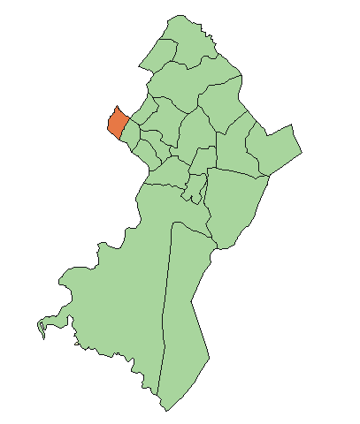 Ubicación de Lambaré.